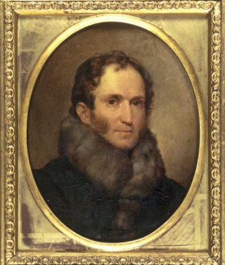 Князь Г.И.Гагарин (1782-1837)